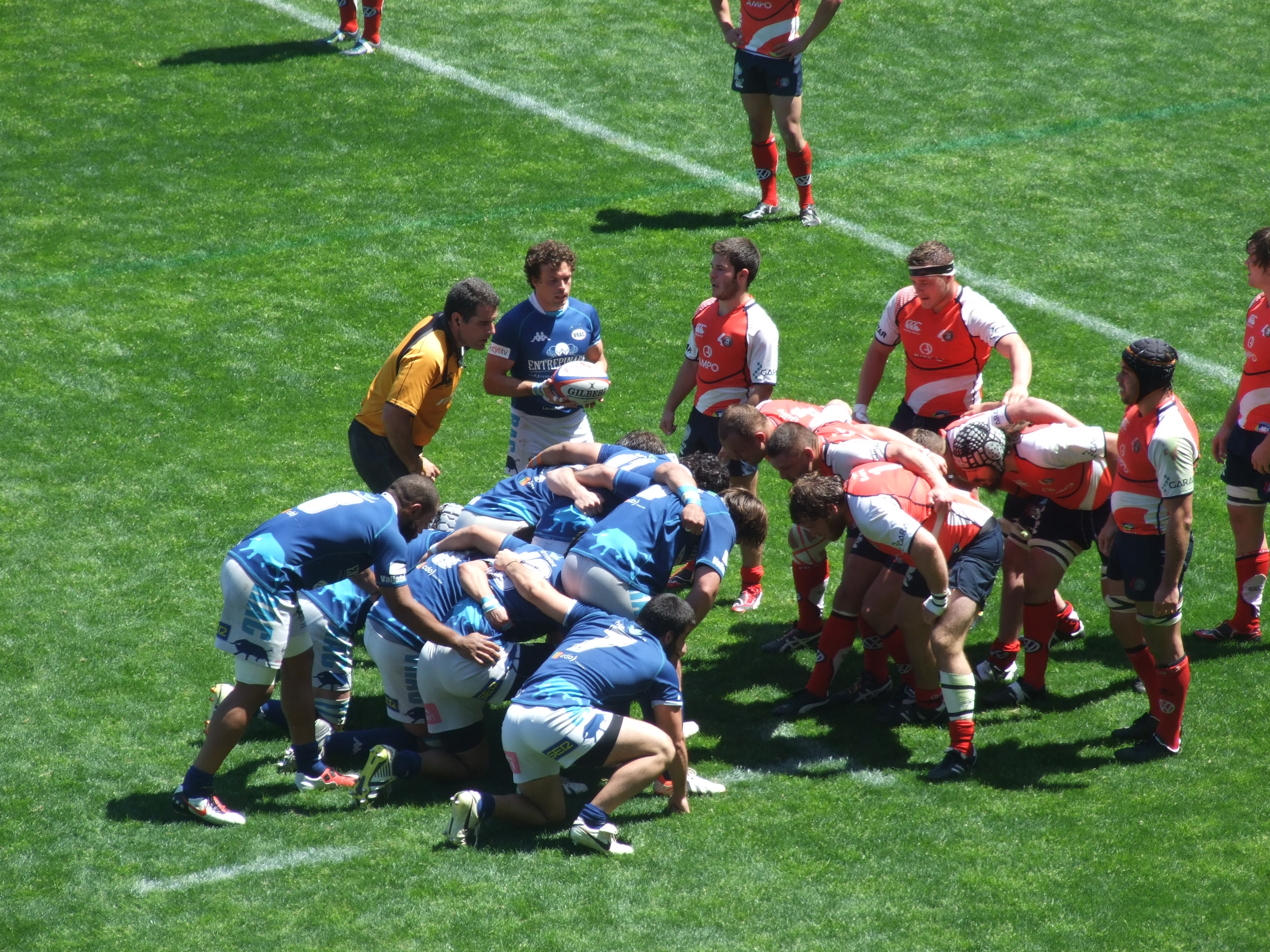 Copa del Rey de rugby 2013. VRAC Quesos Entrepinares ante AMPO Ordizia.